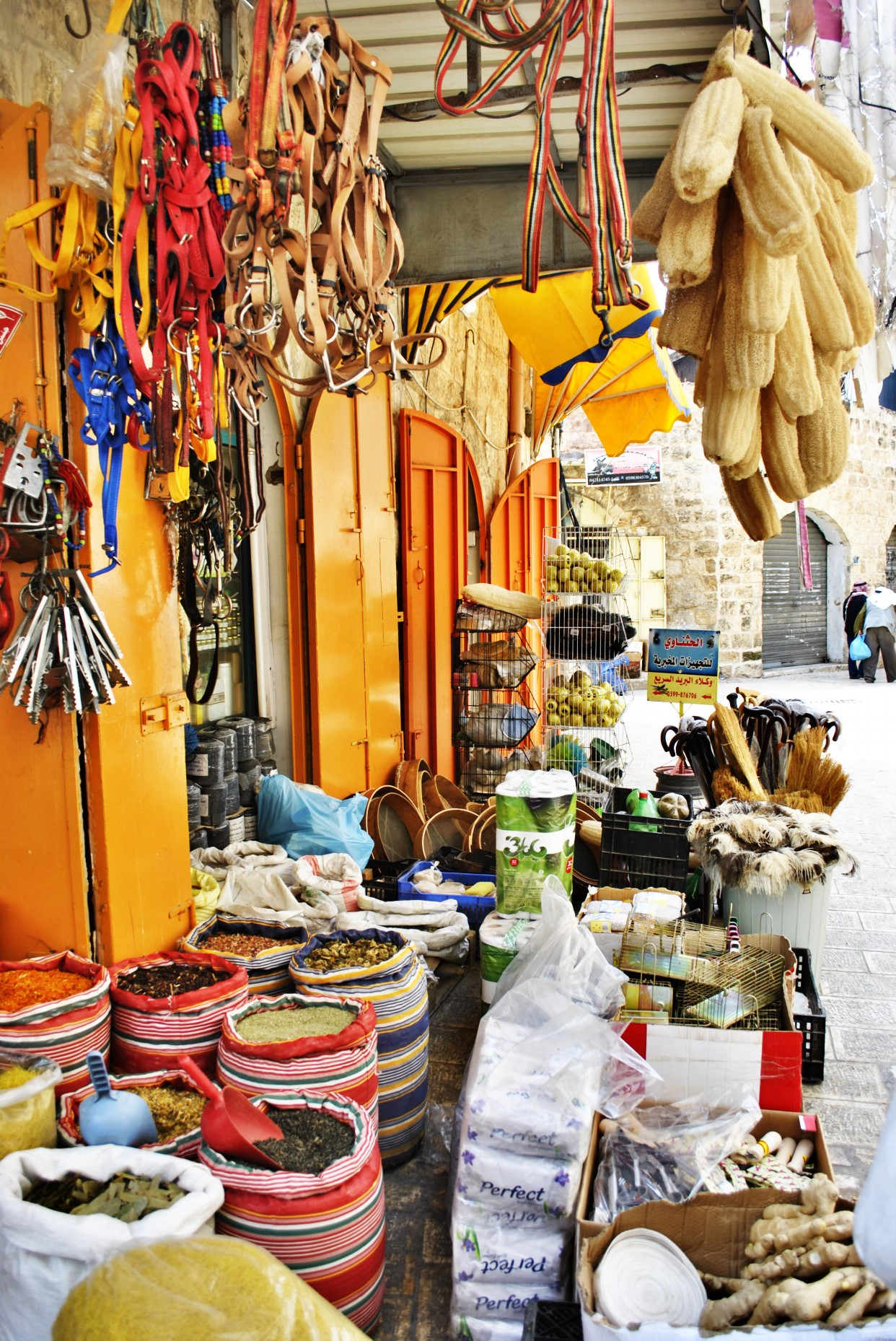 Jenin By Maysa Alshaer